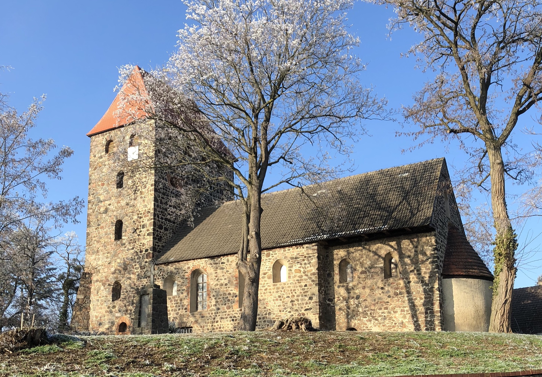 Dorfkirche Hohenziatz